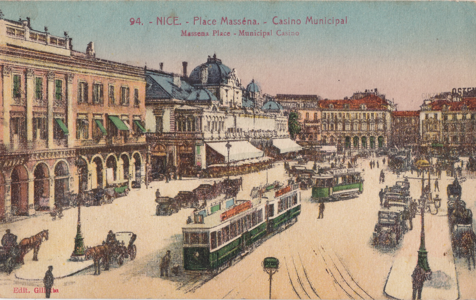 Carte postale ancienne éditée par Gilletta, n°94 :NICE - Place Masséna - Casino Municipal